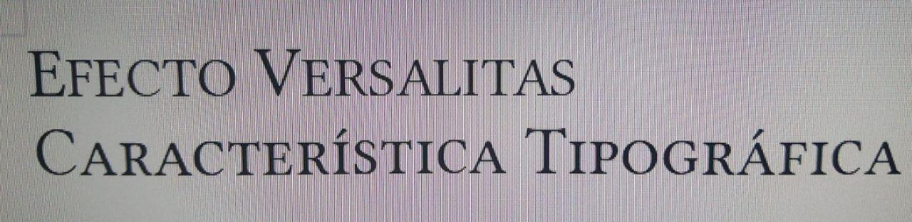 Muestra de la diferencia entre versalita simulada (arriba) y versalita con características tipográficas (abajo).